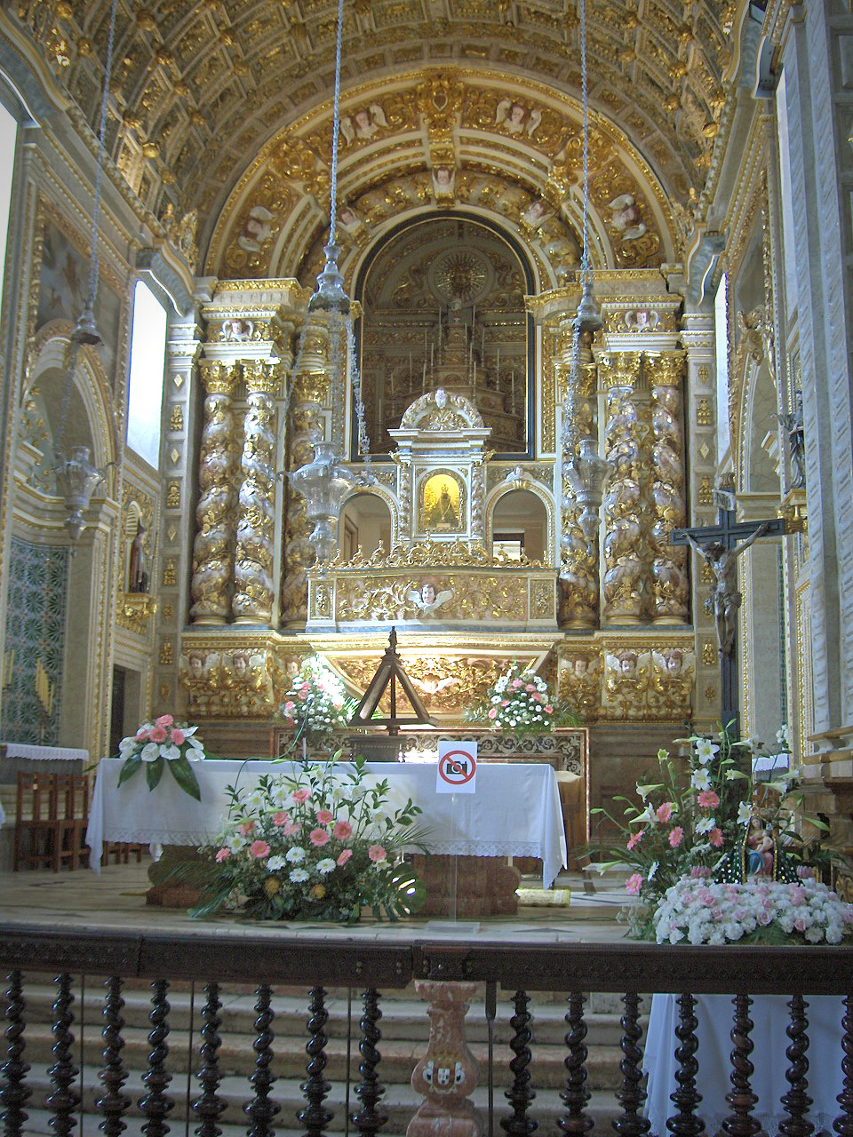 Main altar - Church of Nossa Senhora da Nazaré in Nazaré, Portugal